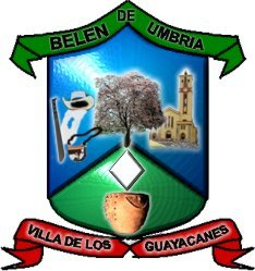 ESTE ES EL ESCUDO DE ARMAS DEL MUNICIPIO DE BELEN DE UMBRIA RISARALDA